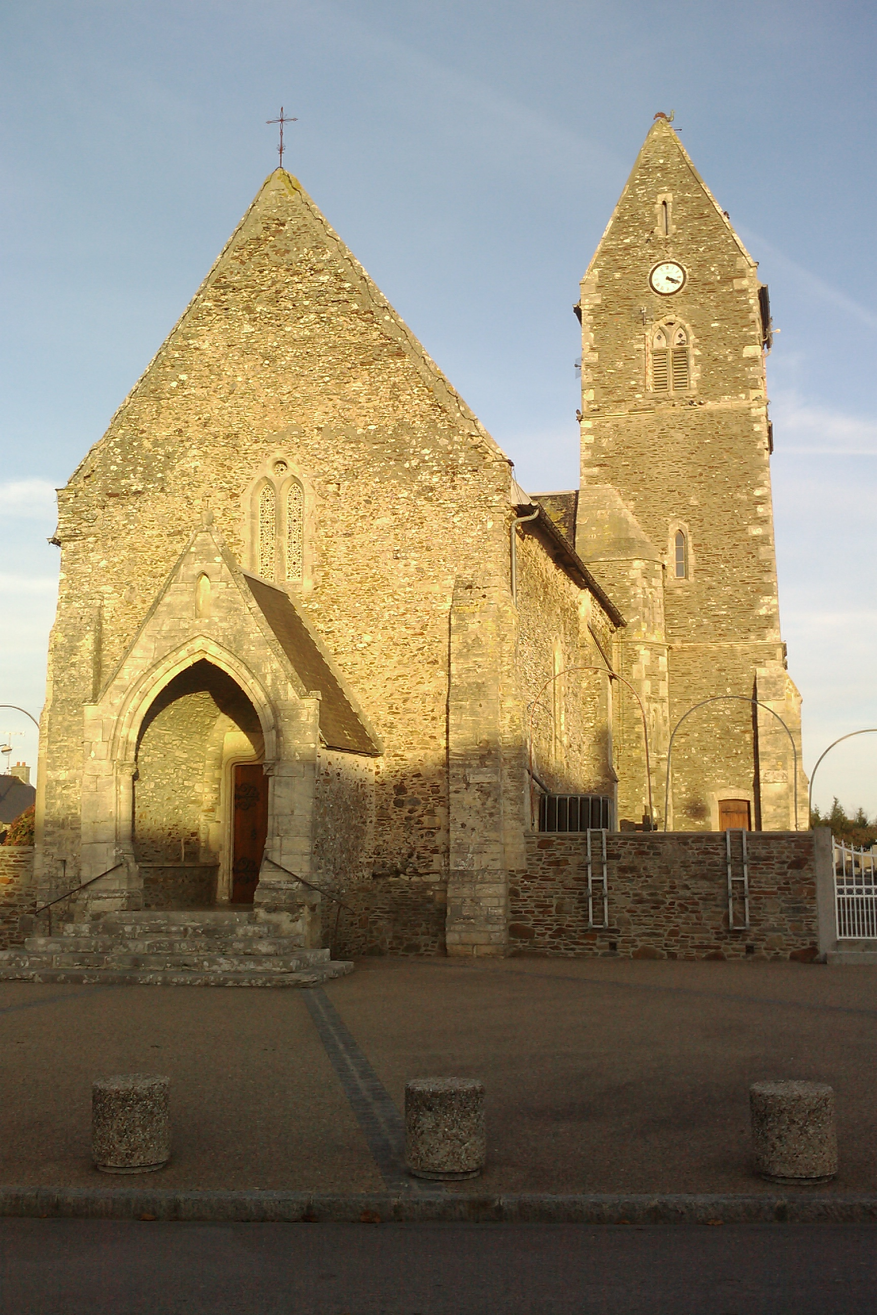 Église Saint-Clair de Saint-Clair-sur-l'Elle